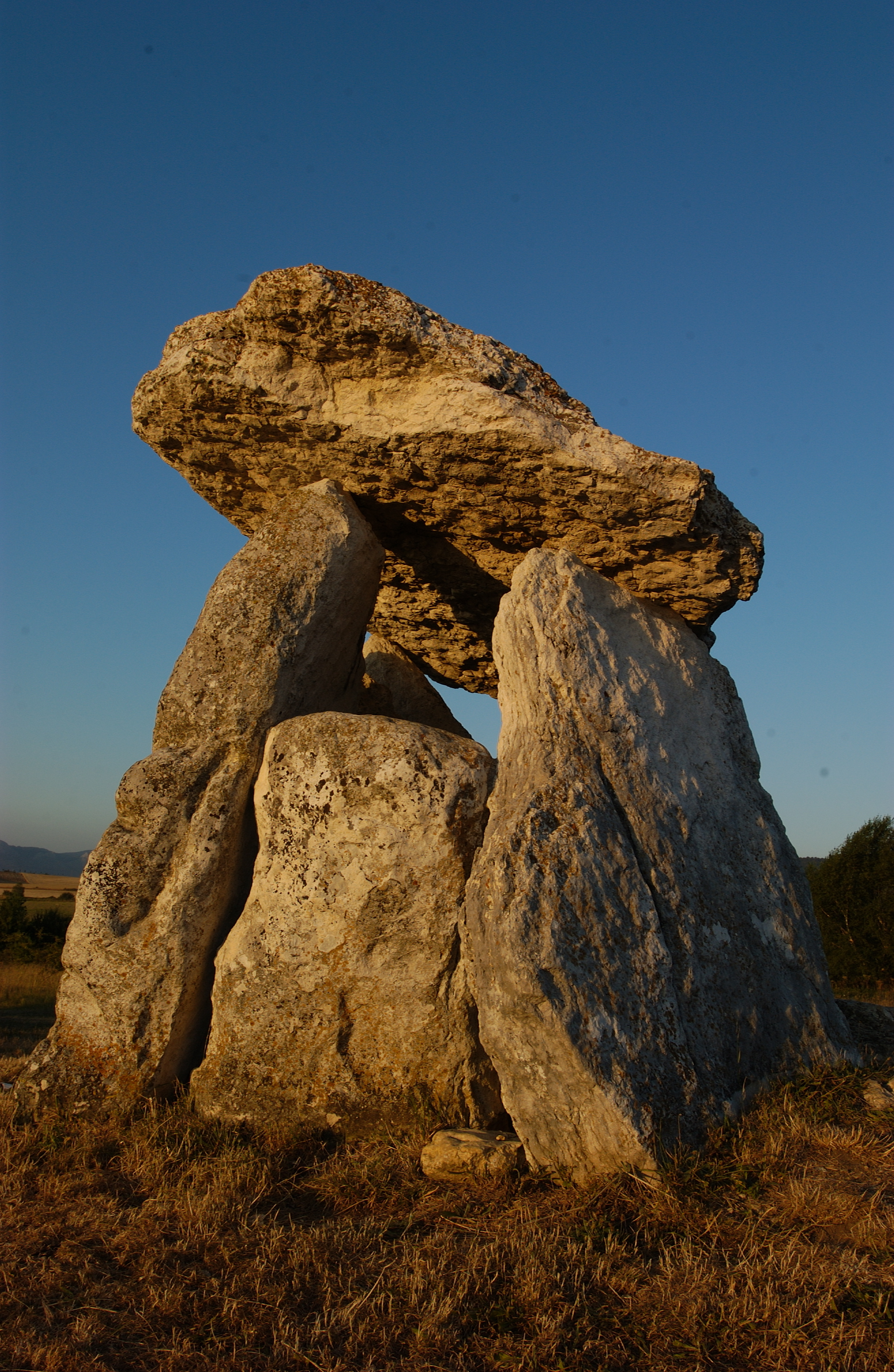 Dolmen de Sorginetxe